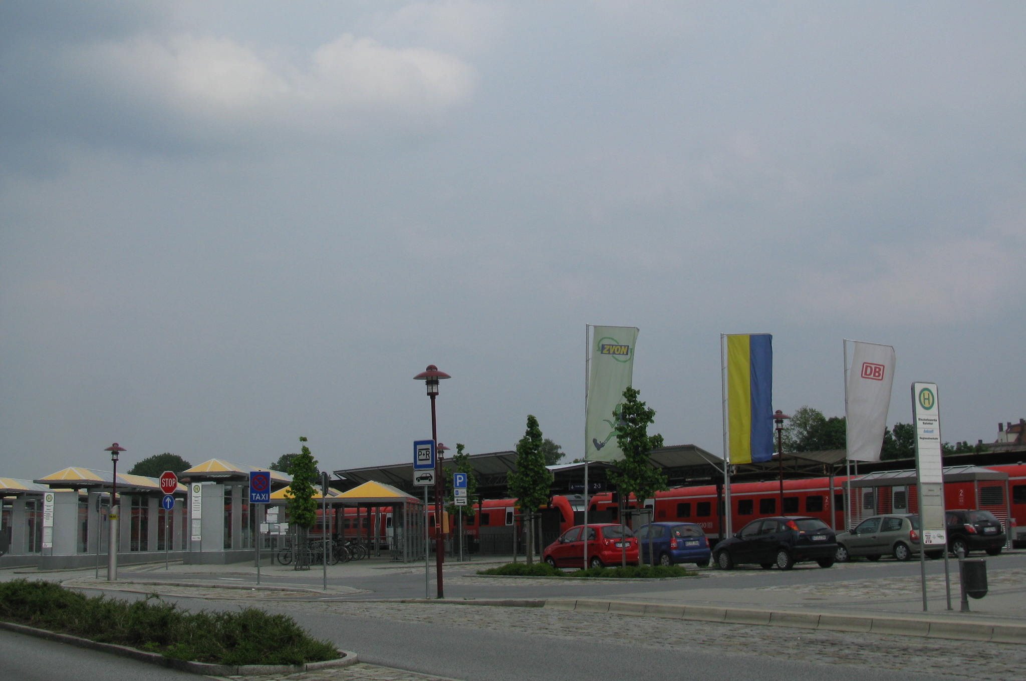 Der Vorplatz des Bischofswerdaer Bahnhofes - „Übergangsstelle“ zwischen Bus, Bahn und Individualverkehr - nach seiner im Mai 2005 abgeschlossen Neugestaltung.